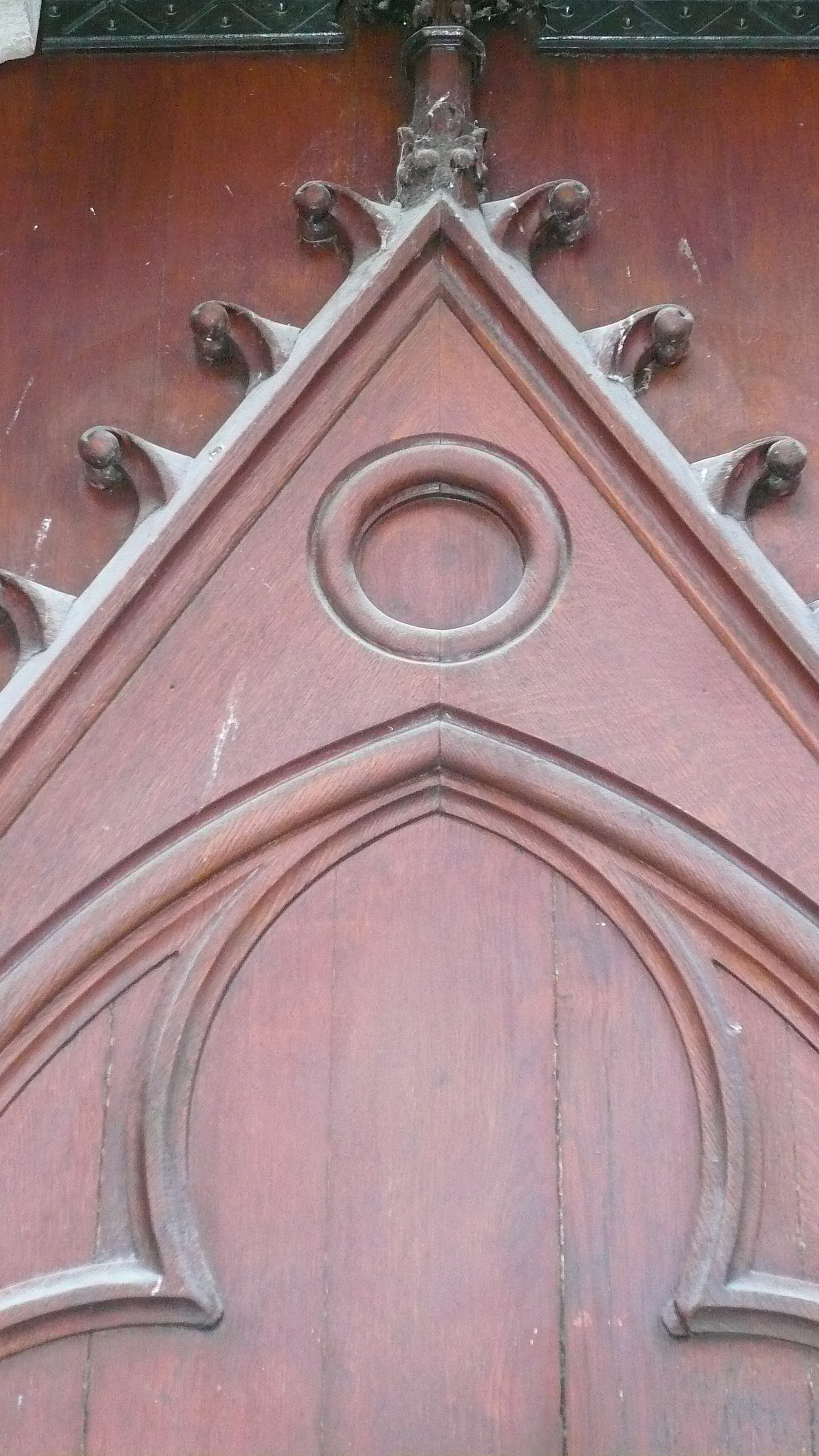 Montbenoît. L'Abbaye. La porte du monastère (détail). L'abbaye ne devient pas, comme l'abbaye de St-Claude, une principauté écclésiastique, elle reste sous la suzeraineté féodale des Sires de Joux. Chaque fois qu'un nouvel abbé est élu, le seigneur, Le Sire de Joux, se présente à la porte du monastère, entouré de ses vassaux et de ses hommes d'armes. L'abbé, crosse en main et mitre en tête, l'accueille et lui offre les clefs de la maison sur un plat d'argent. Pour bien marquer son autorité, le sire gouverne la communauté pendant toute la journée.